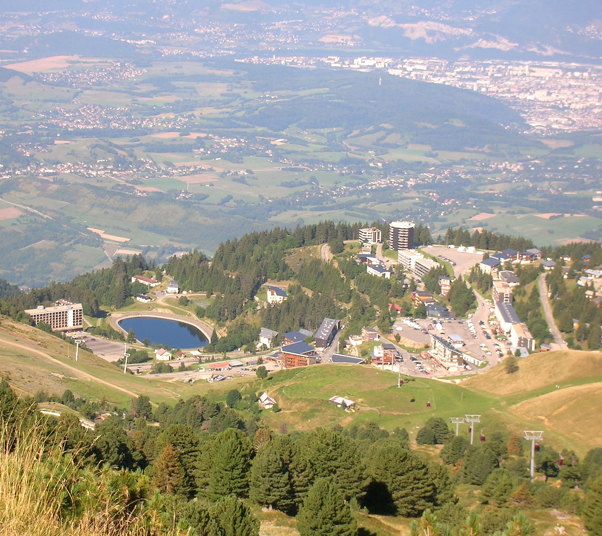 Chamrousse. Journée de l'Ultratour des 4 massifs (UT4M). Chamrousse, Isère, AuRA, France.